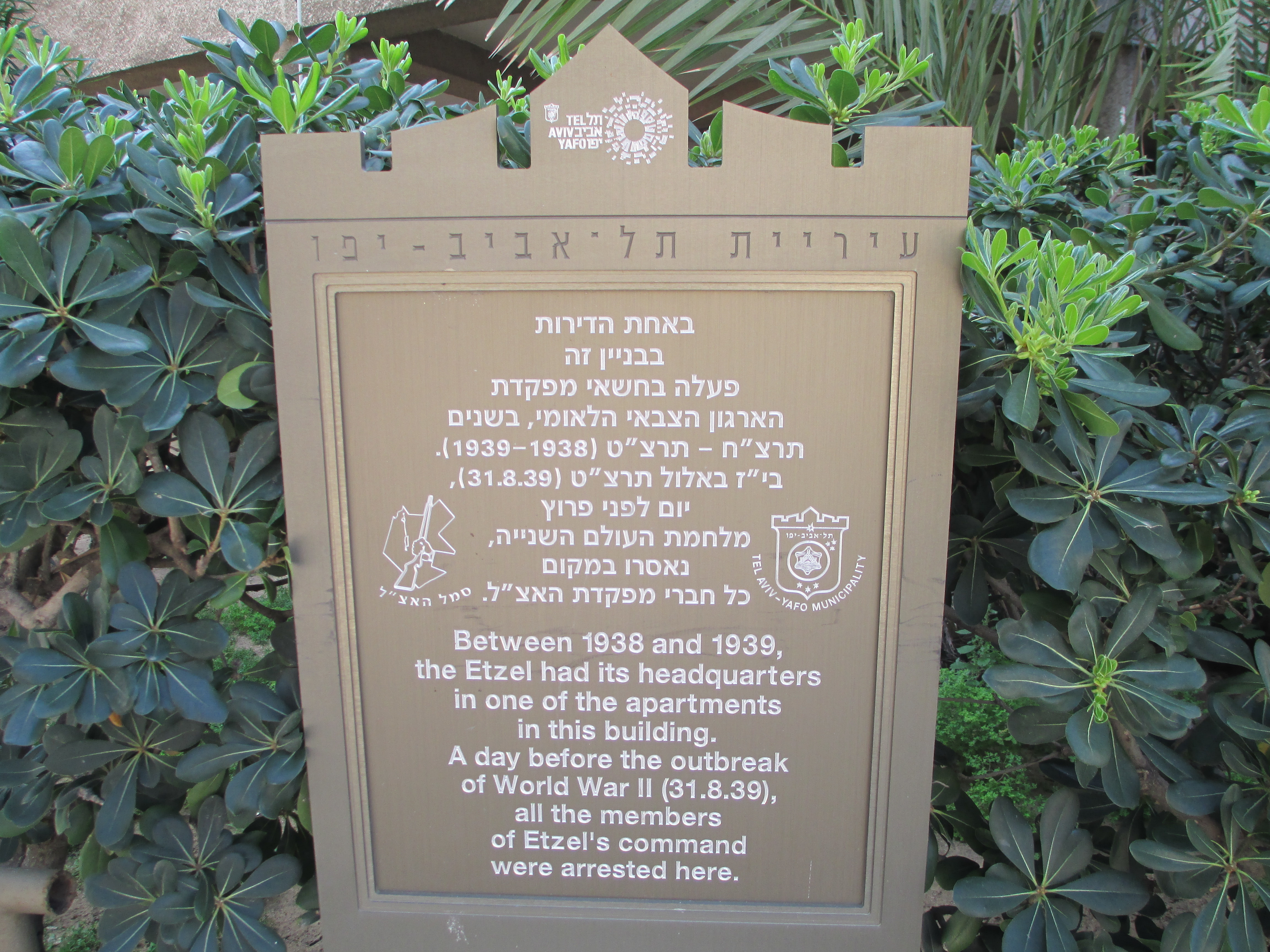 לוחית זיכרון של אצ"ל ברחוב אהרונוביץ' 6 בתל אביב